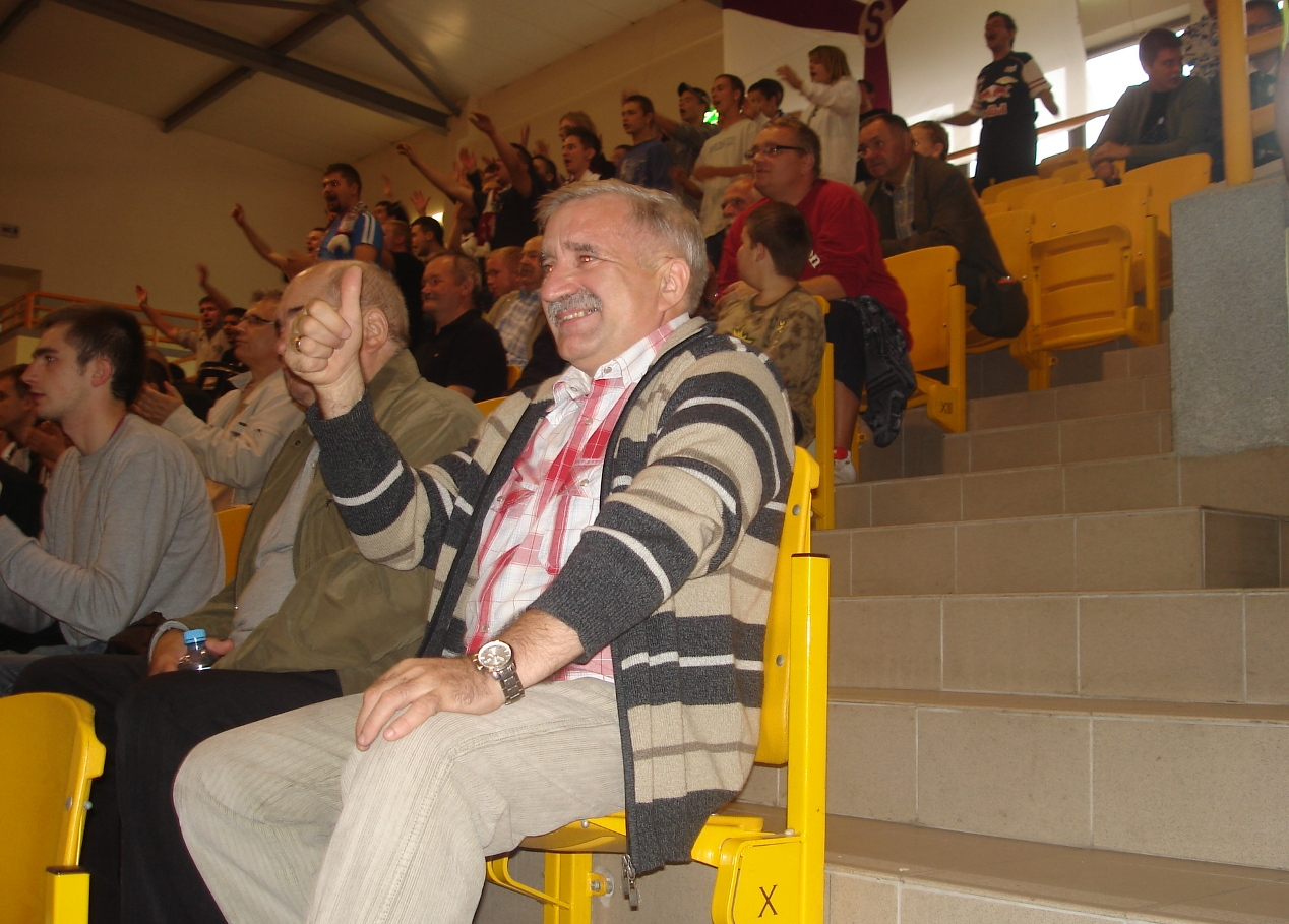 Stargard Szczeciński, 2010 r. Kibice Spójni podczas meczu